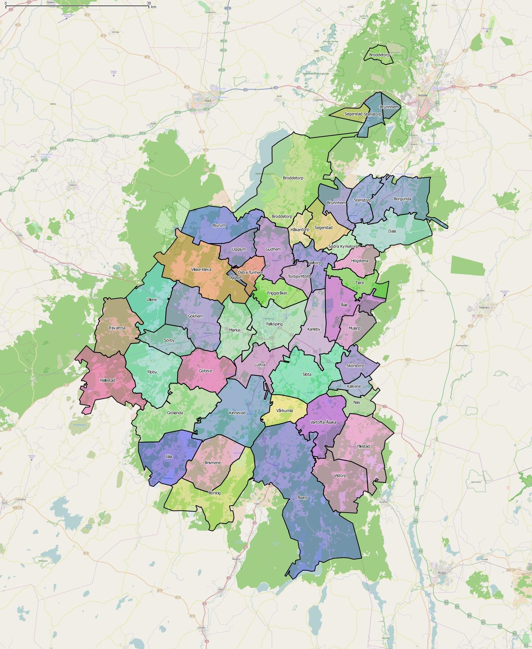 Distriktsindelningen i Falköpings kommun